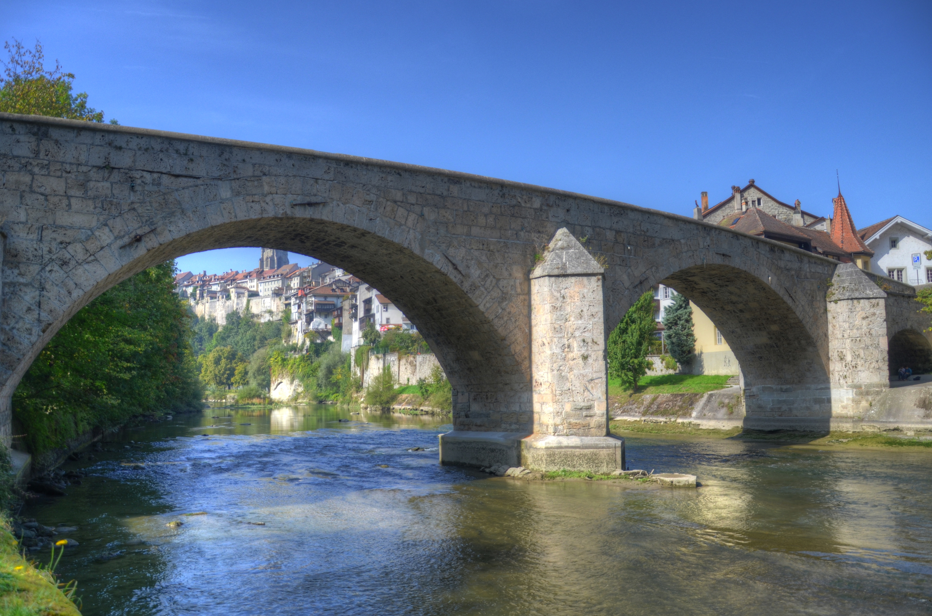 Pont du Milieu in Fribourg (CH) mit der Saane und der Altstadt in Hintergrund